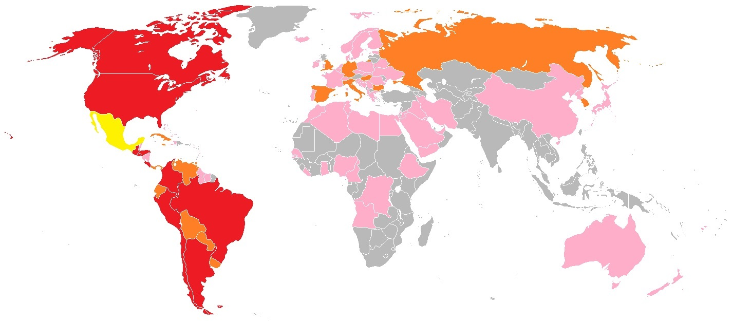 Carte de statistiques des matchs du Mexique contre les autres sélections mondiales